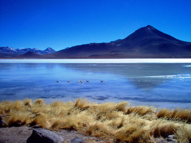 Laguna Blanca, Bolivia.